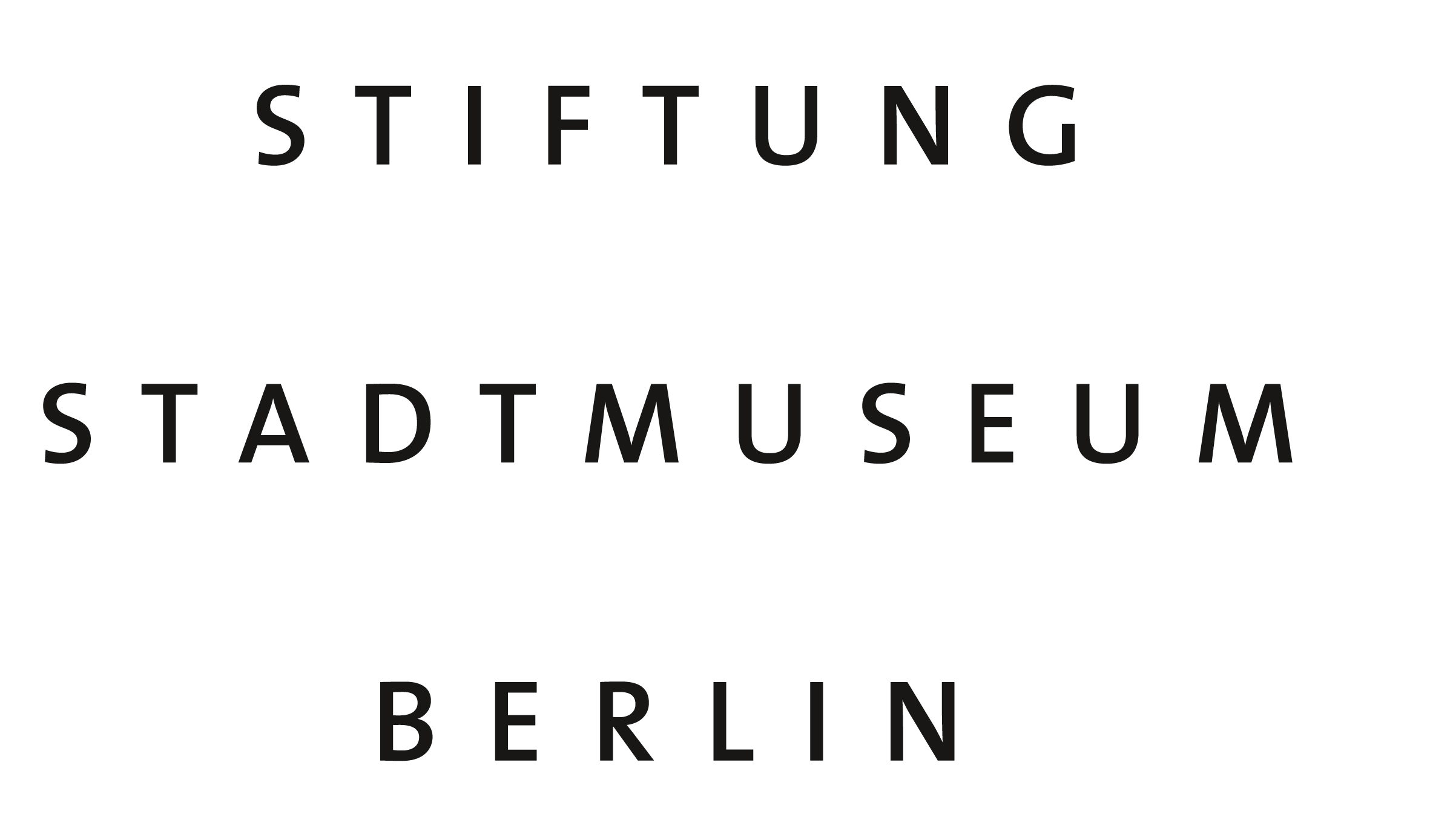 Entwurf: Studio Good